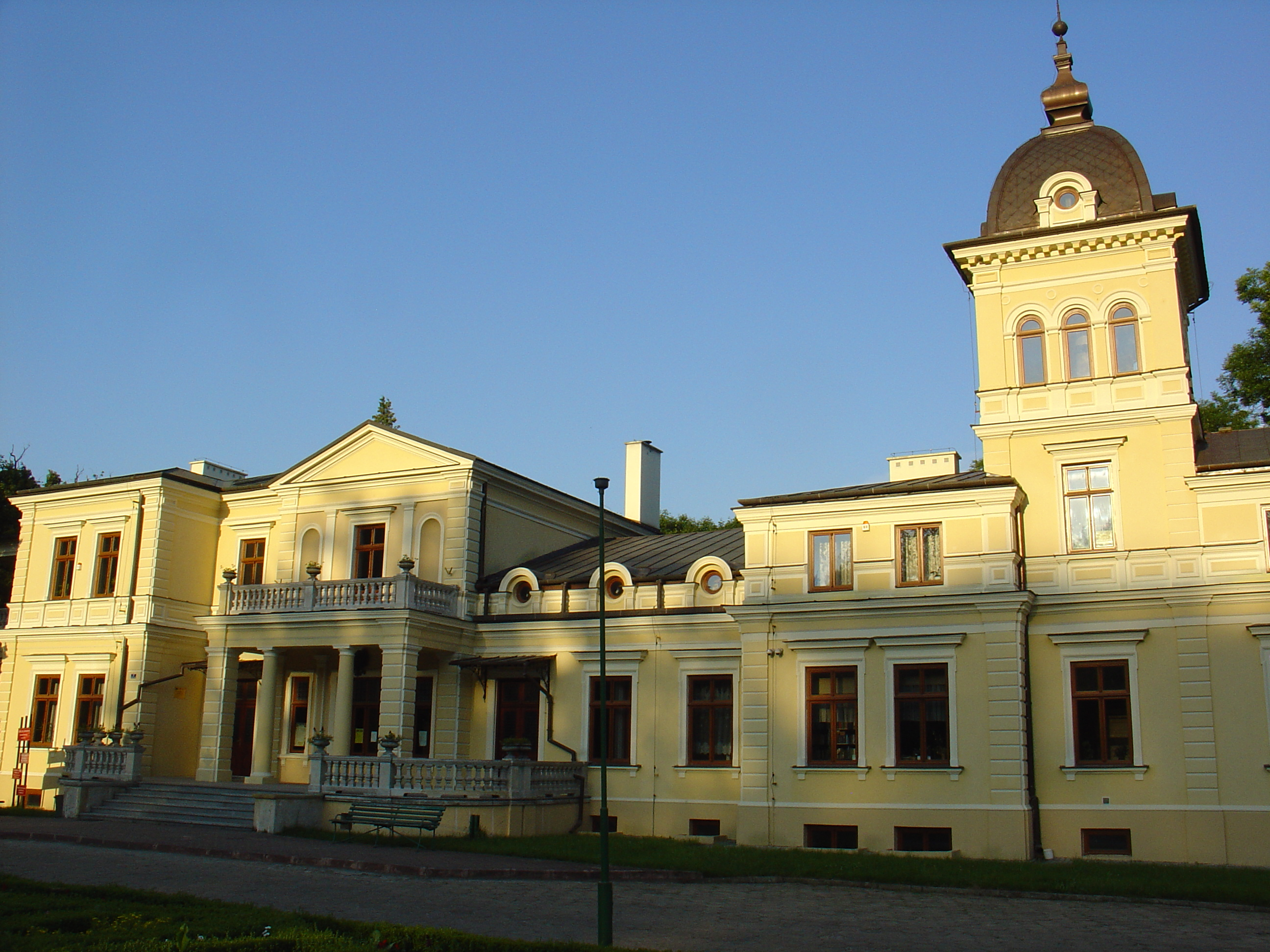 Zespół pałacowy: - pałac - park - szkoła - stajnia Kluczkowice-Osiedle, Opole Lubelskie 06.1975;.